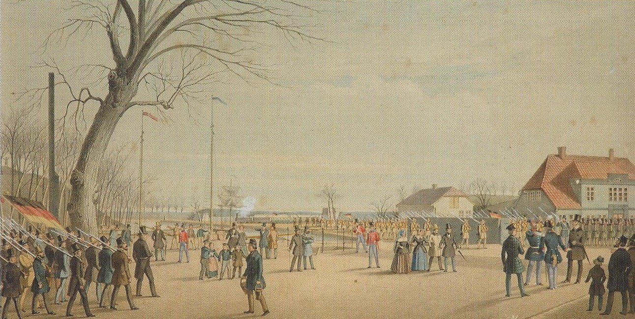 Kolorierte Postkarte zur Einnahme der dänischen Festung Rendsburg durch Schleswig-Holsteiner am 24. März 1848